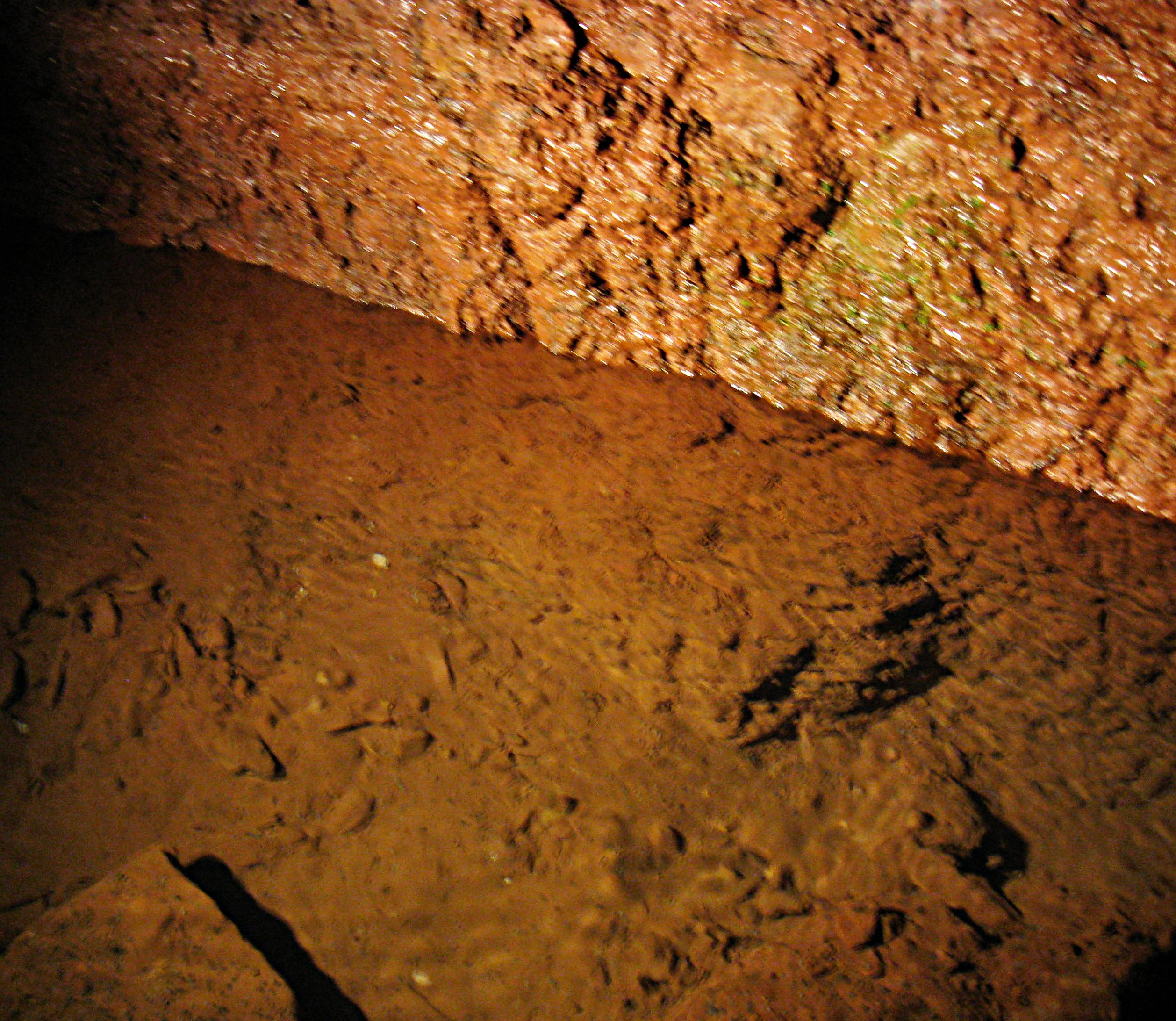 Zisterne im Erzbergwerk in St.-Anna-Stollen